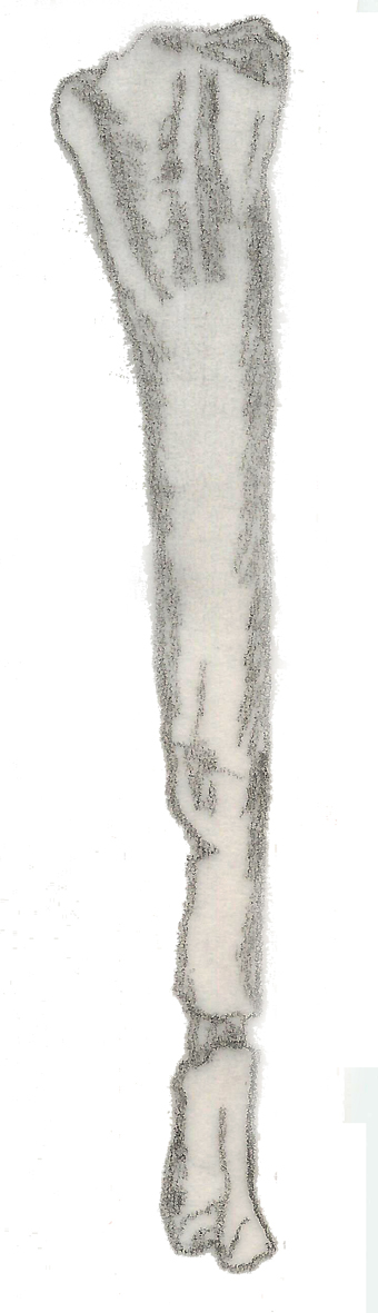 Illustration of a fossil of Dolichosuchus